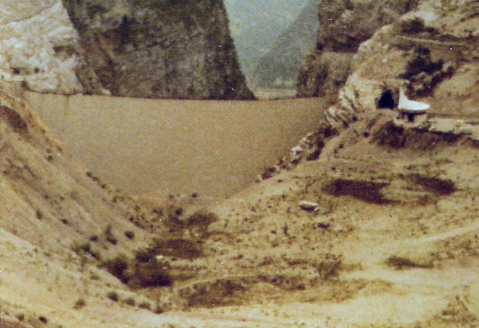 Blick auf Vaiont-Staudamm seeseitig. Rechts eine kleine Gedächtniskapelle.